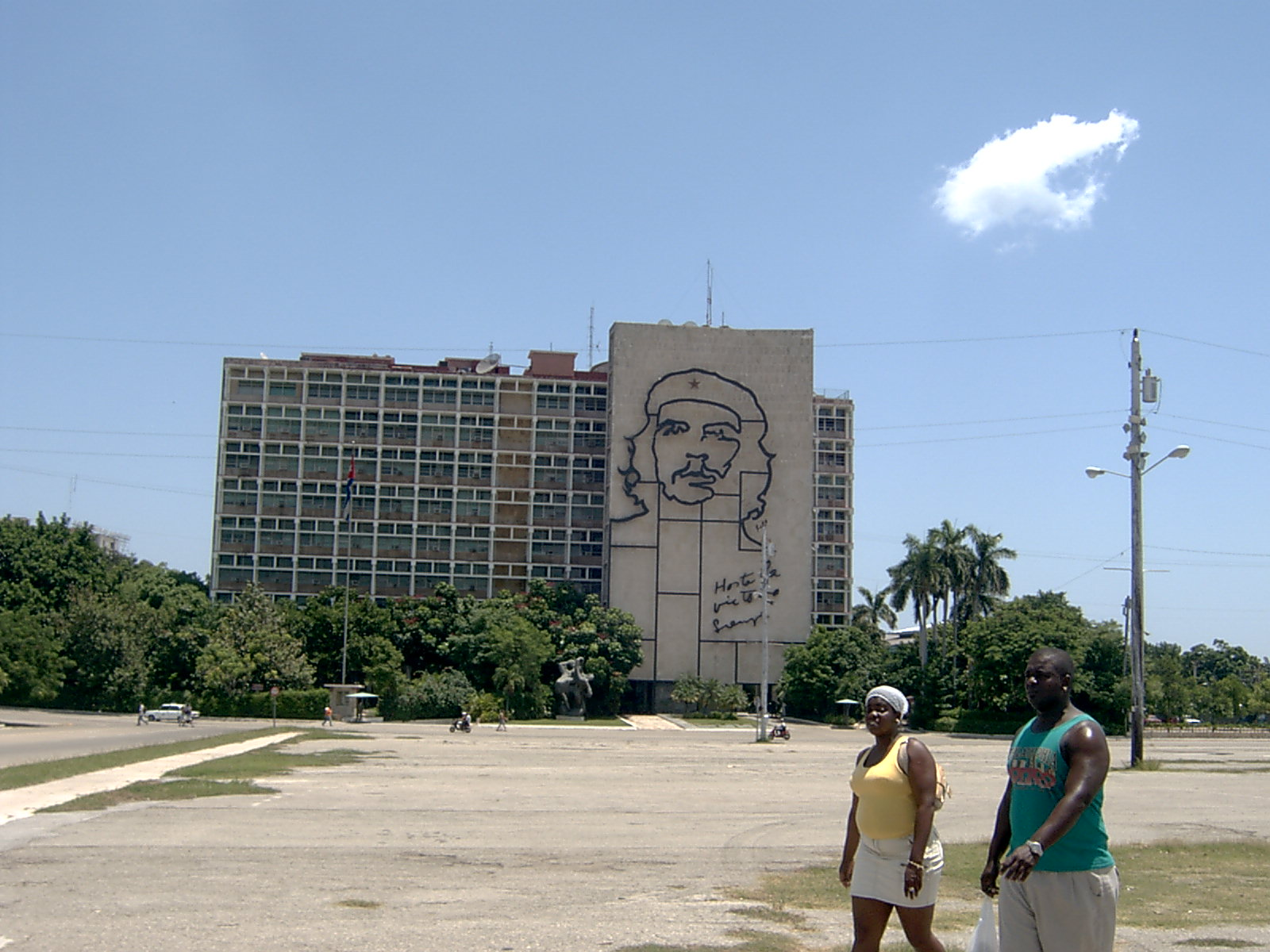 Il Ministero degli Interni del governo Cubano, a La Habana, su cui è presente il famoso ritratto di Che Guevara